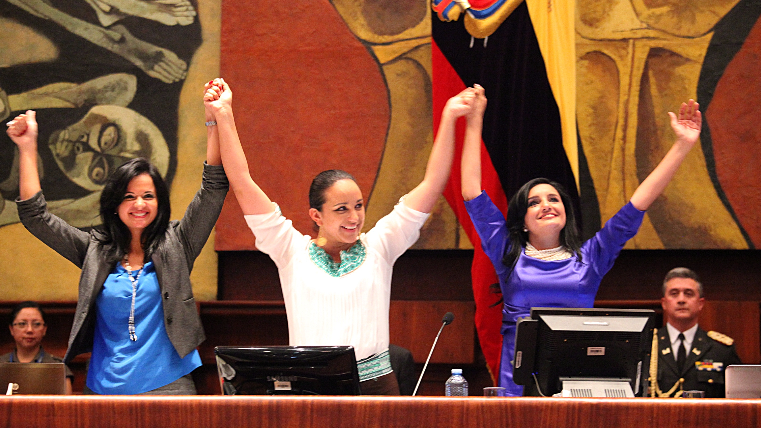 Foto: Hugo Ortiz Ron / Asamblea Nacional